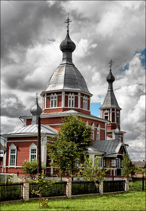 Востраў. Царква Пятра і Паўла